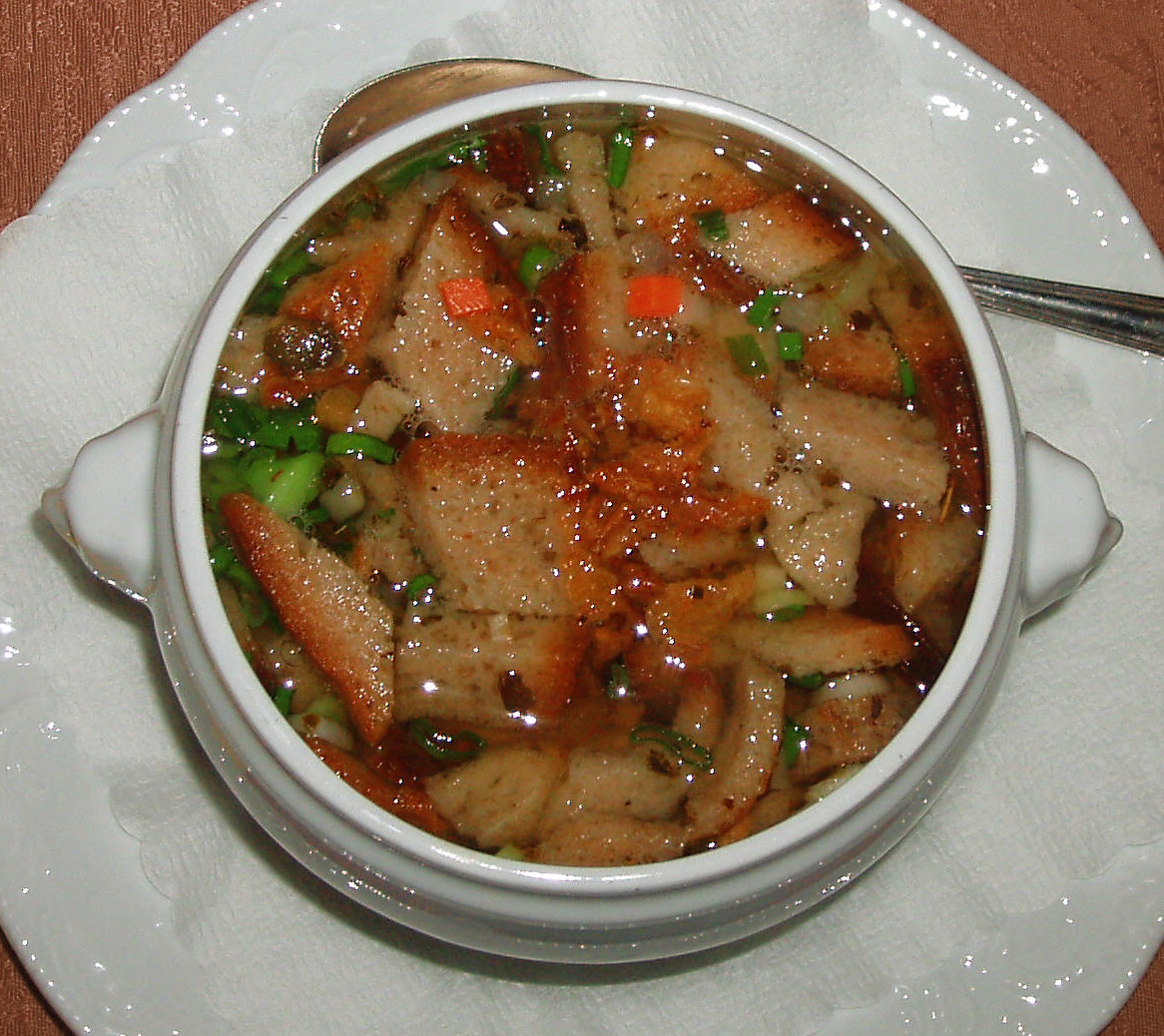 Fränkische Brotsuppe